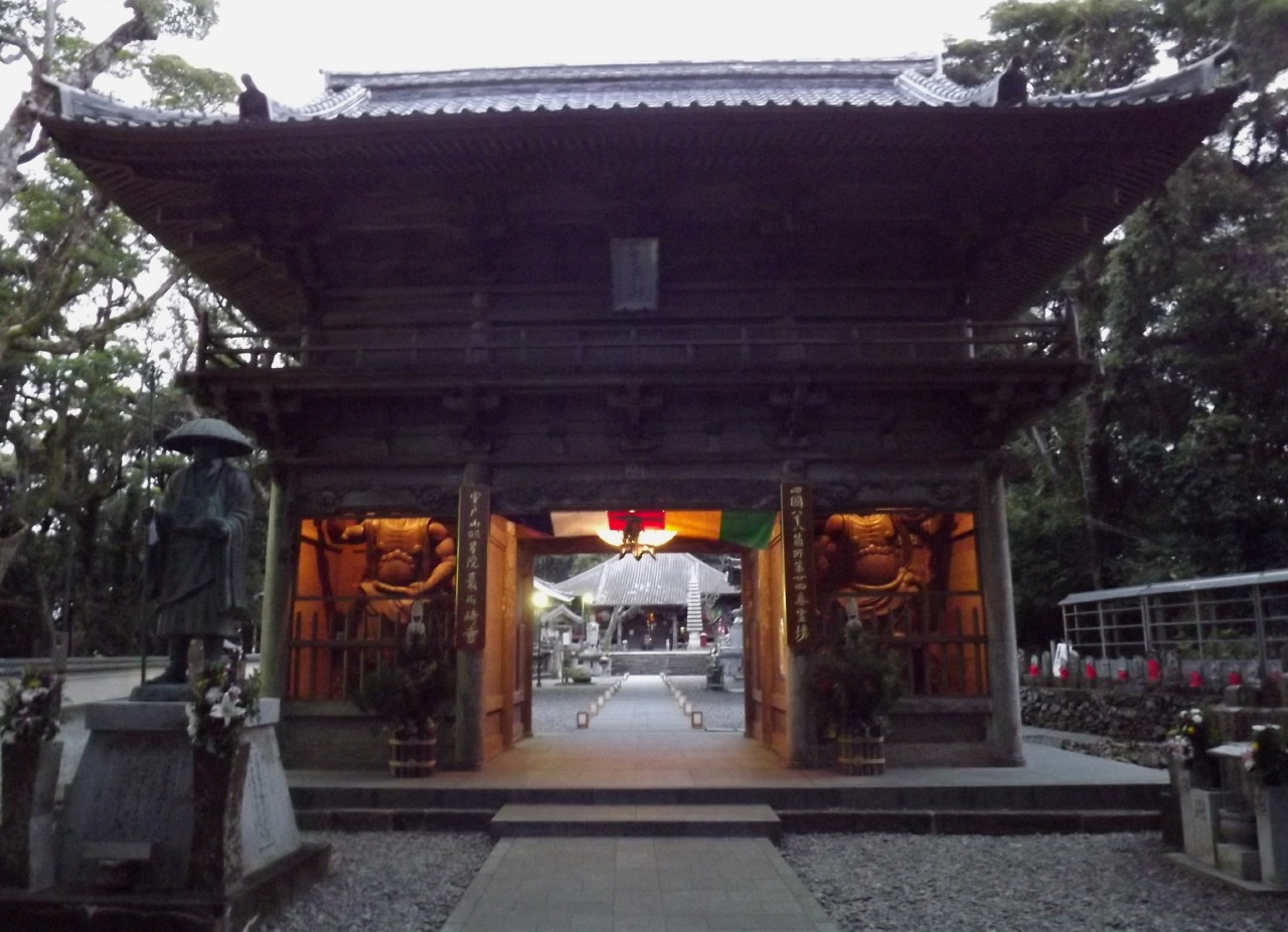 最御崎寺の山門